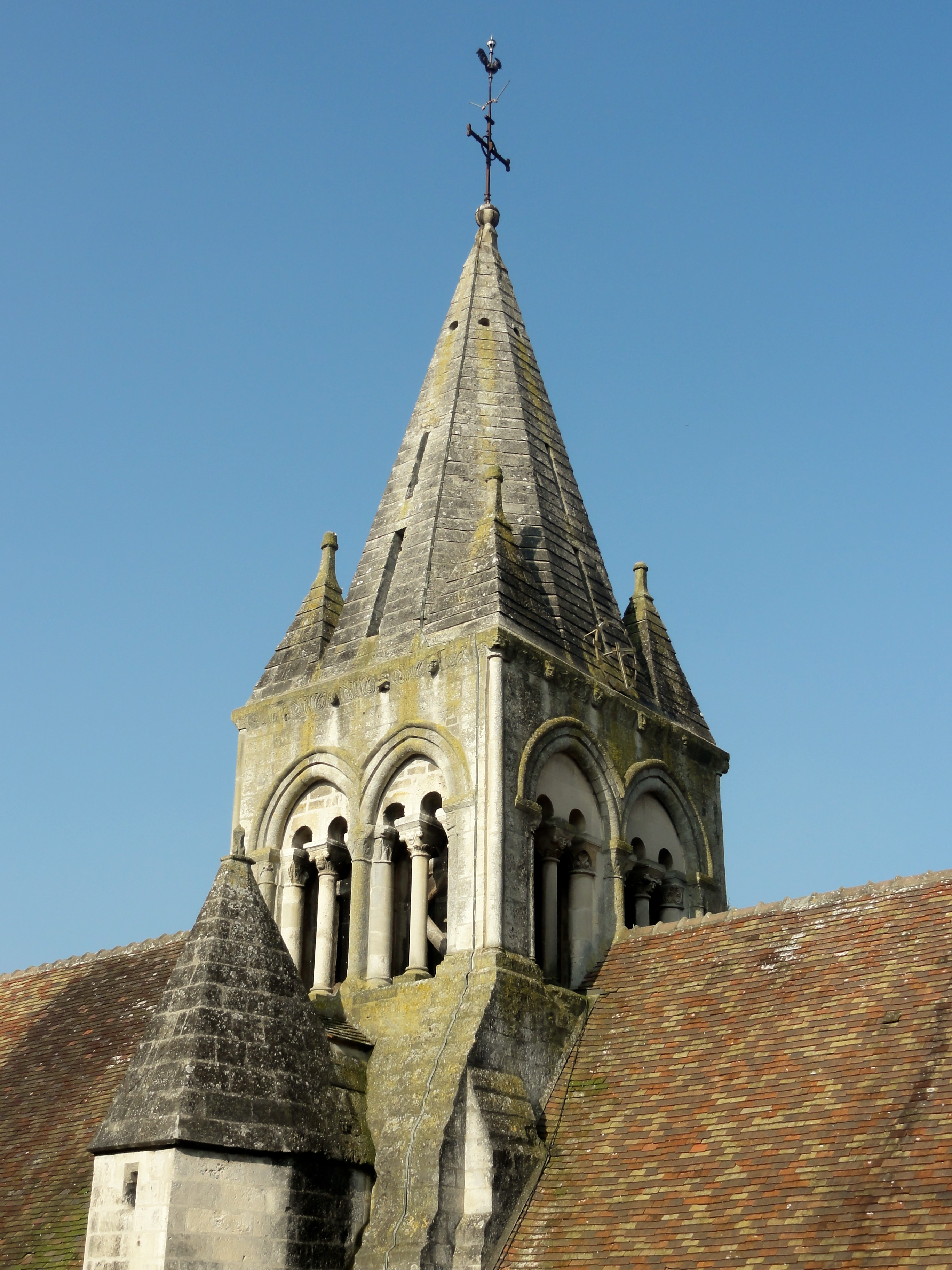 Le clocher.